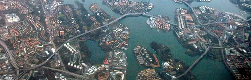 Aerial view of Essingeleden